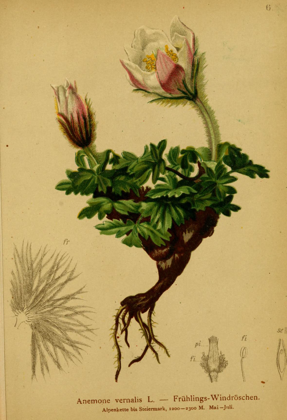 k Anemone vernalis L. — Frühlings-Windröschen. Alnenkette bU Steiermark, 1200-2300 M. Mai-JnH.